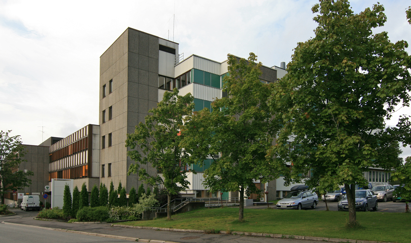 Hamar sjukehus.